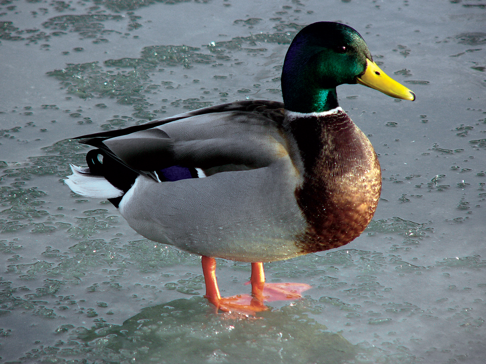 Anas platyrhynchos male (Lahn/Germany)